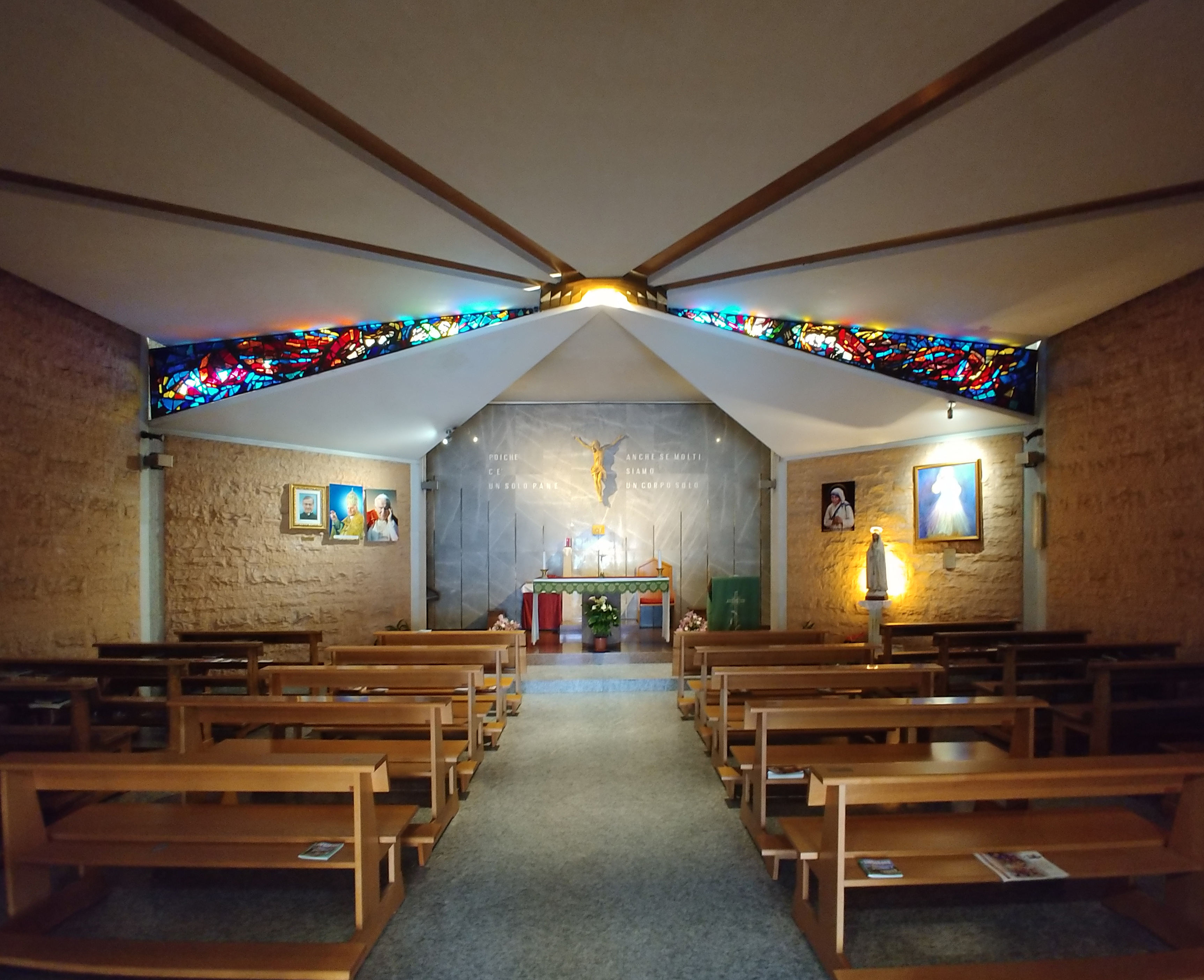 La cripta.